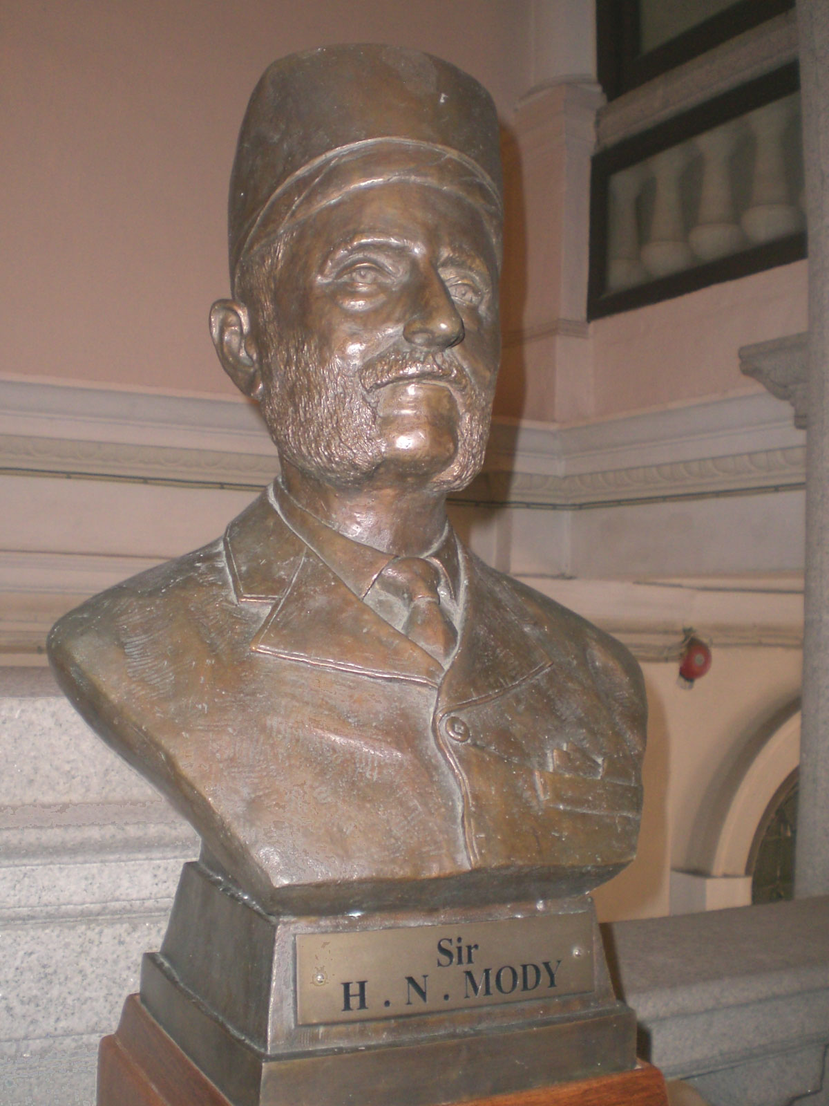 Sir Hormusjee Naorojee Mody, 香港大學校園內的麼地爵士塑像, 位於香港大學本部大樓陸佑堂入口